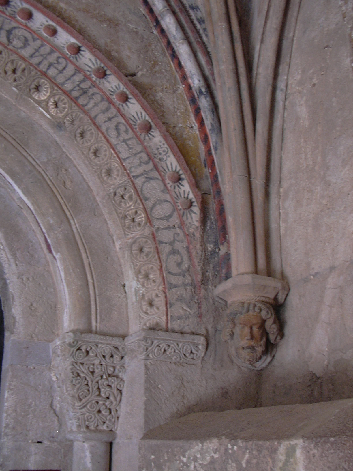 Veruela - Claustro - Detalle